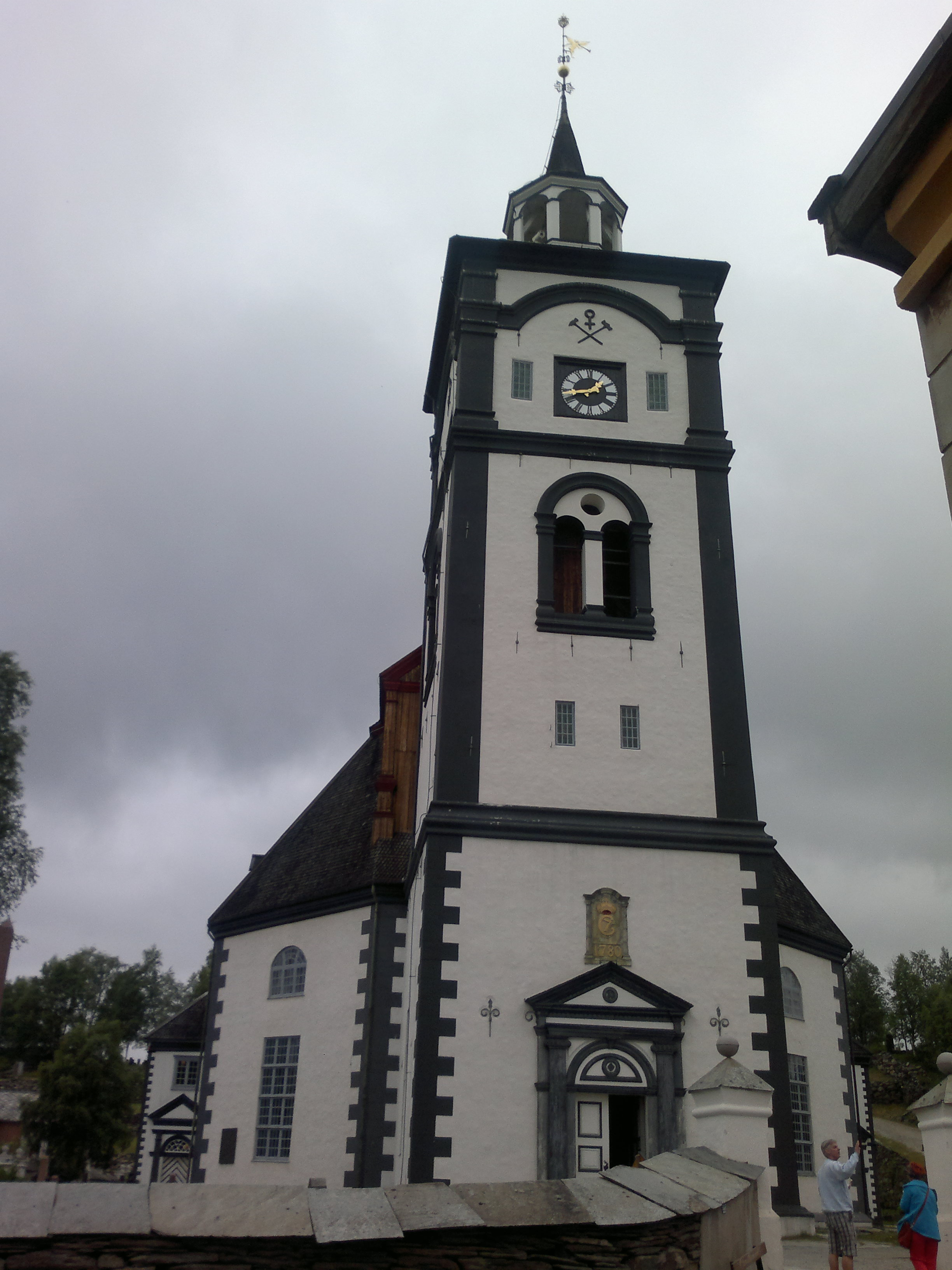 Rørosin kirkko Norjassa, Etelä-Trøndelagin läänissä.